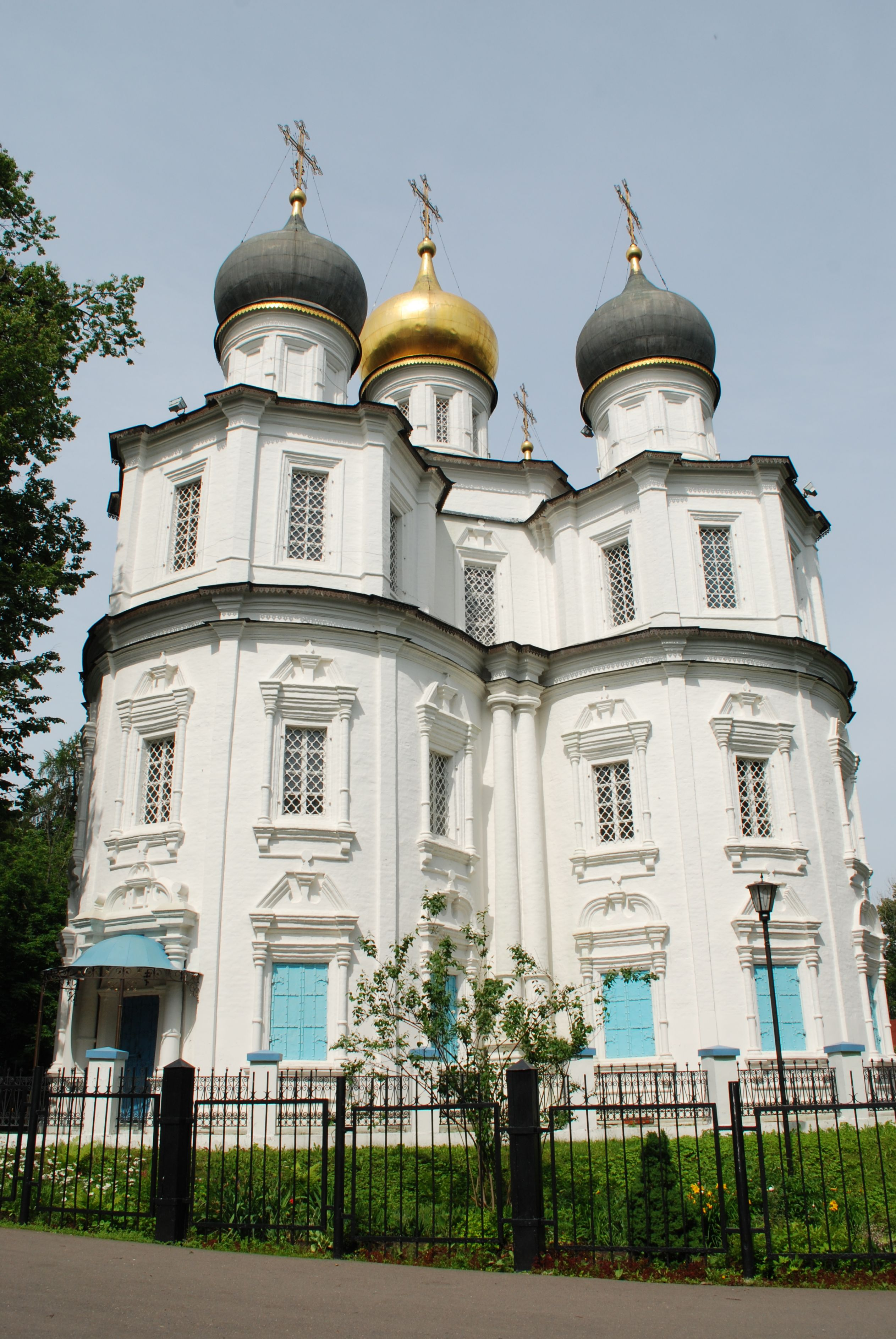 Усадьба Голицыных-Толстых-Трубецких «Узкое» (Москва и Московская область, Щербинка, Профсоюзная улица, 123-а)